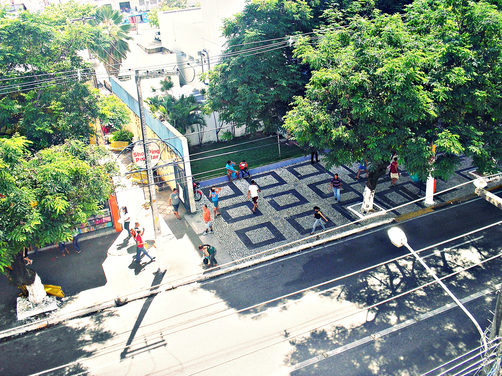 Bairro da Cidade Alta (Centro) em Natal, Rio Grande do Norte, Brasil.